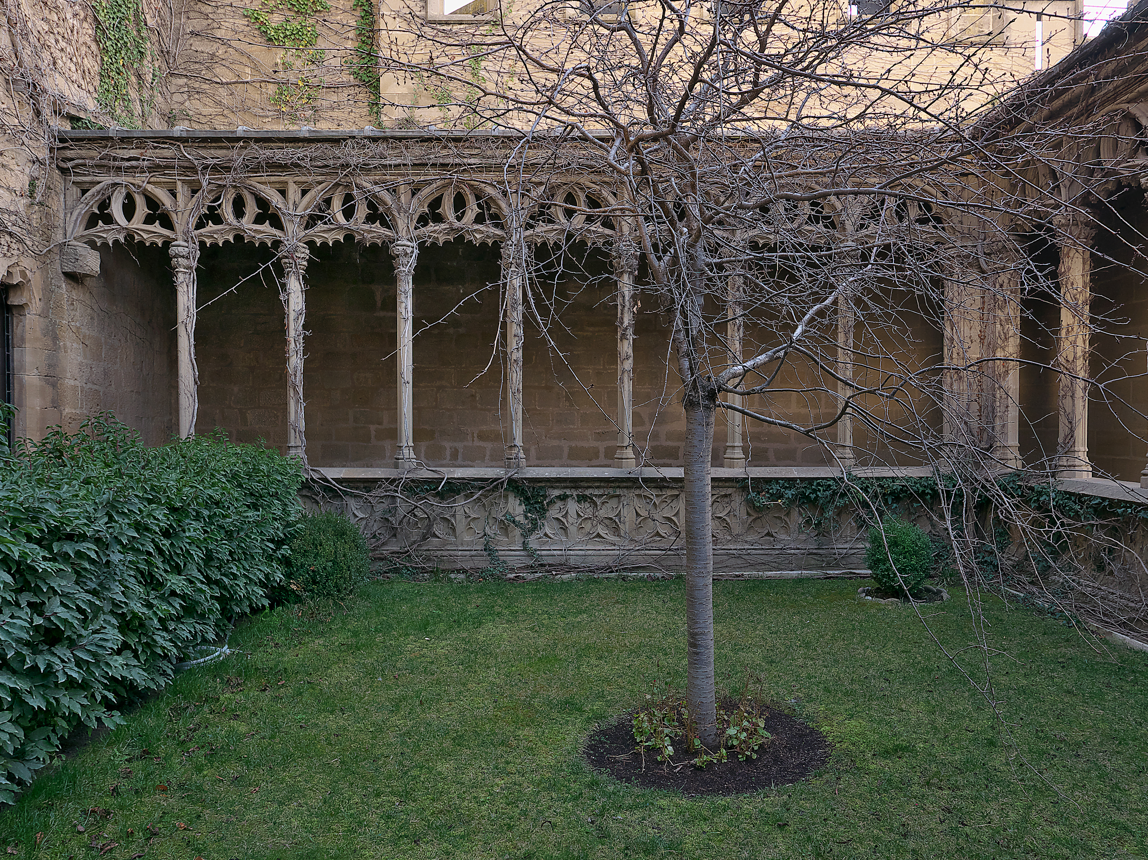 Jardín para el servicio de la reina.